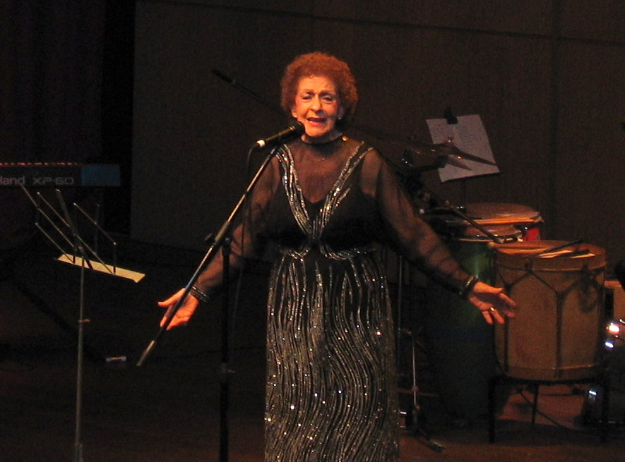 Rosita Londner, durante el reconocimiento organizado por el Departamento de Cultura de Asociación Mutual Israelita Argentina